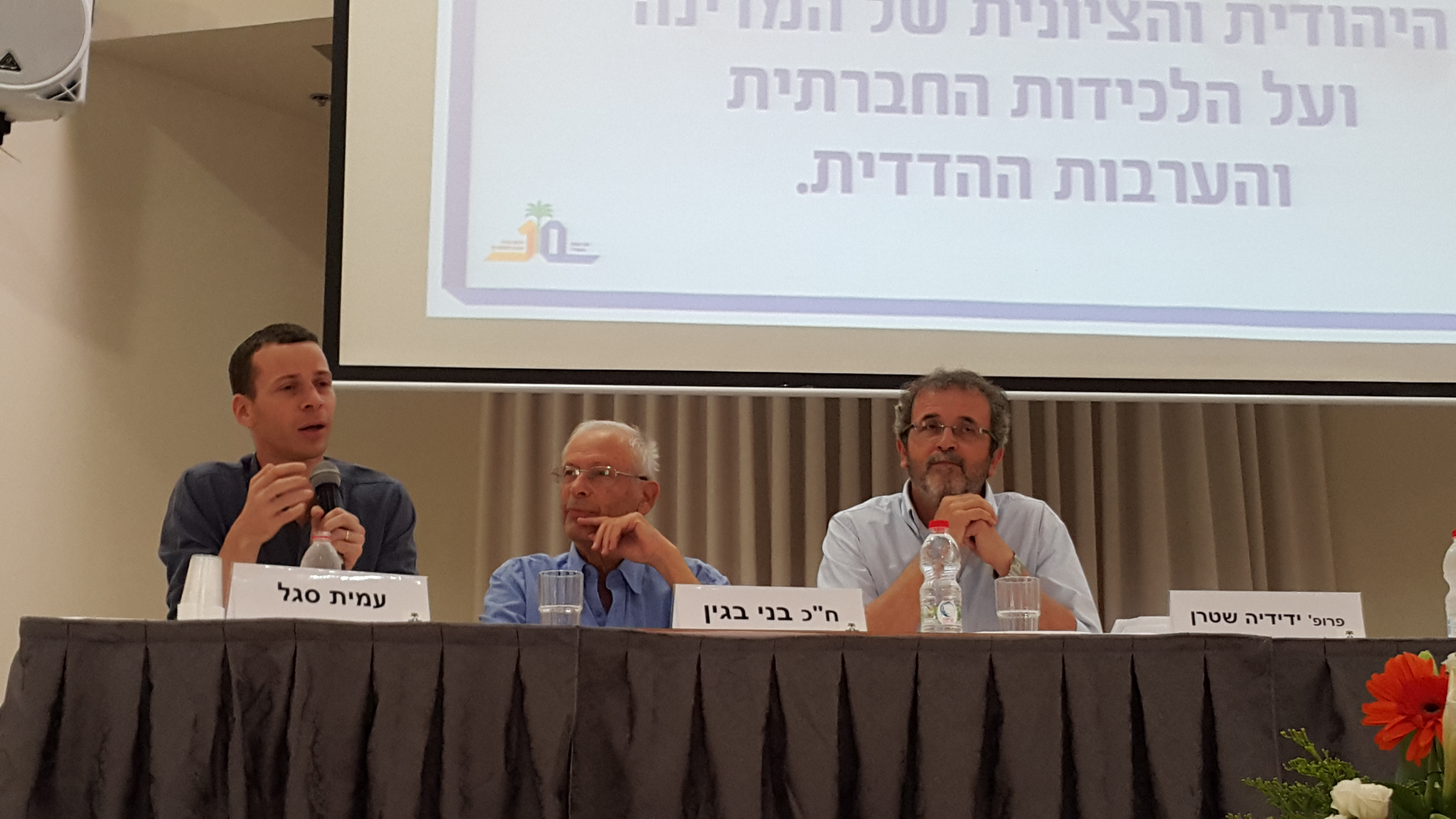 עמית סגל, בני בגין וידידיה שטרן